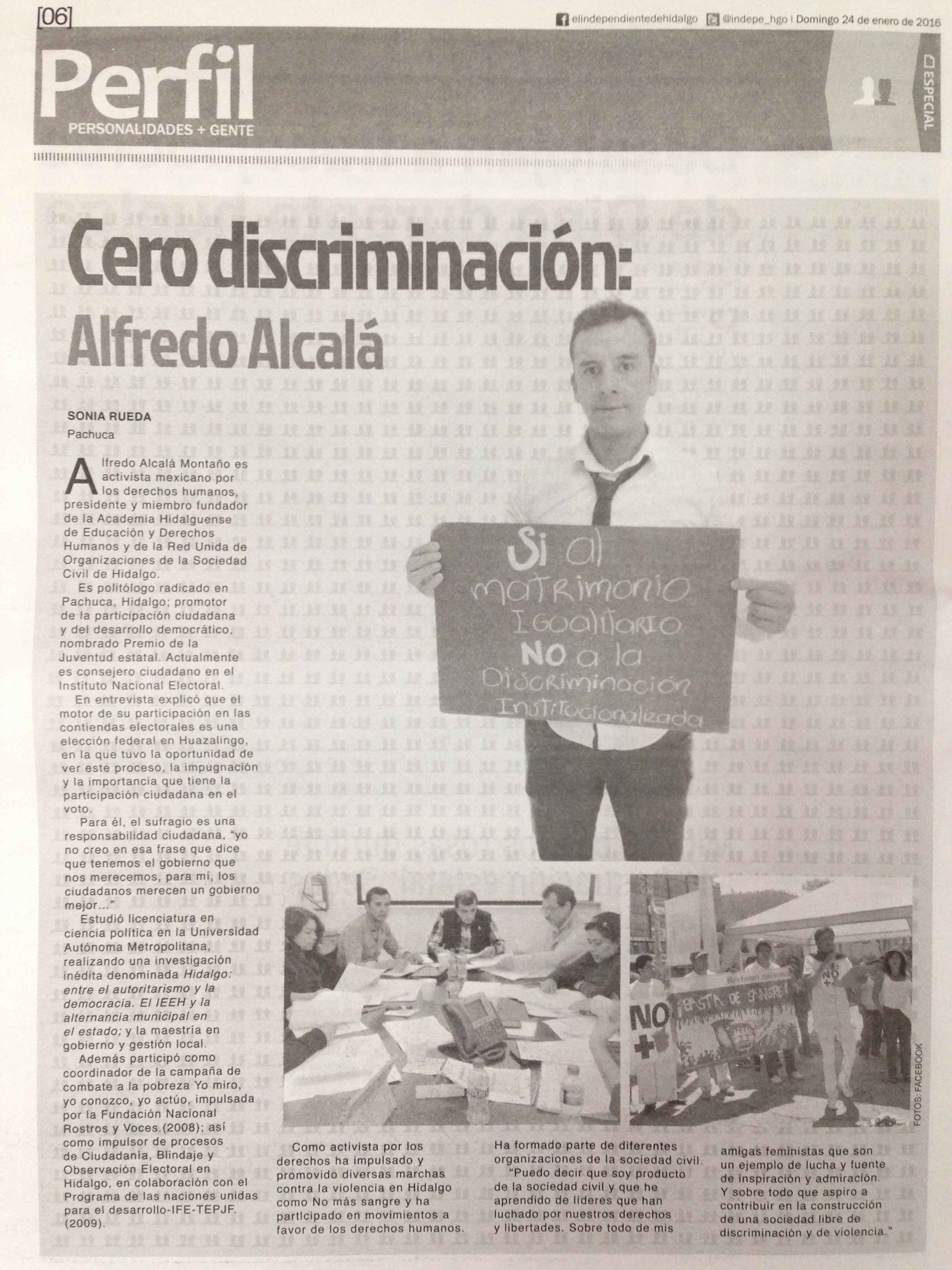 Alfredo Alcalá Montaño. Politólogo y Activista por los Derechos Humanos